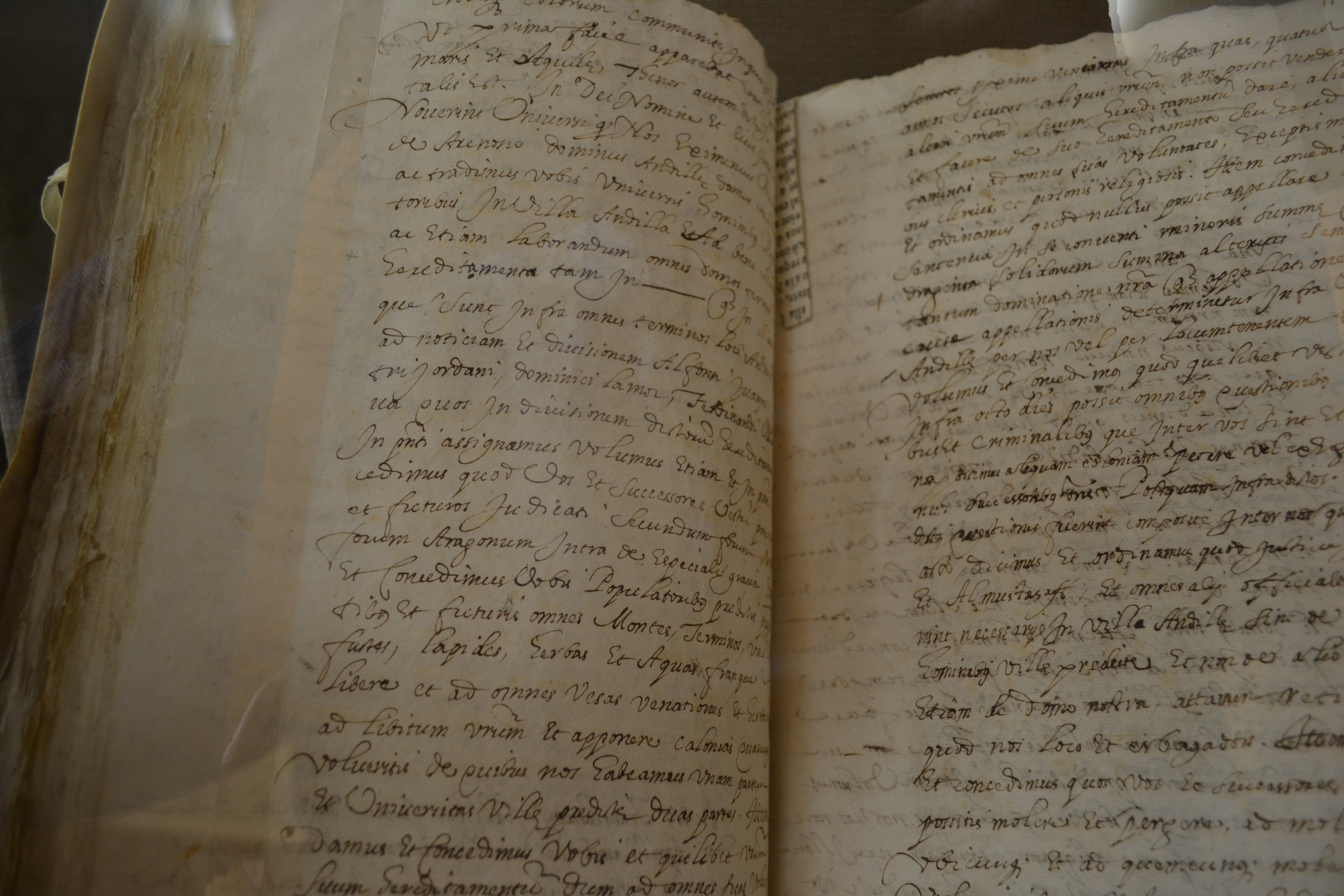 N'Eximén Pérez d'Arenós, senyor d'Andilla, atorga carta pobla a dit lloc per a repoblar-ho amb cristians, a fur d'Aragó (15 d'octubre de 1292). ARV. Manaments i empars, 1640, llibre 3, mà 23, fol. 10 (còpia de de 2 de gener de 1640). Arxiu del Regne de València .